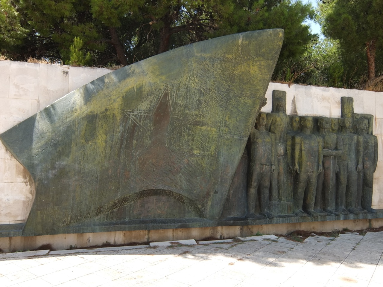 Srpskohrvatski / српскохрватски: Bronačni reljef Kosta Angeli Radovanija u Spomen parku streljanima